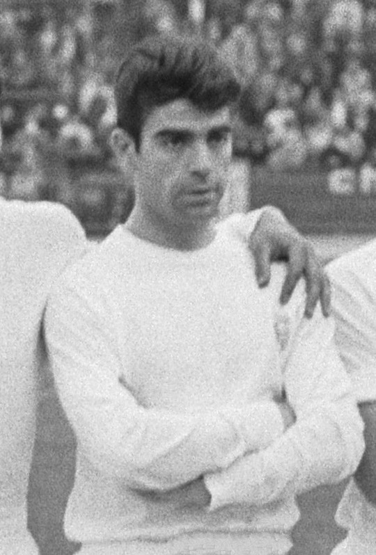 Real Madrid voor de Europacup I-finale tegen FK Partizan in het Heizelstadion, Brussel. Manuel Sanchís Martínez.